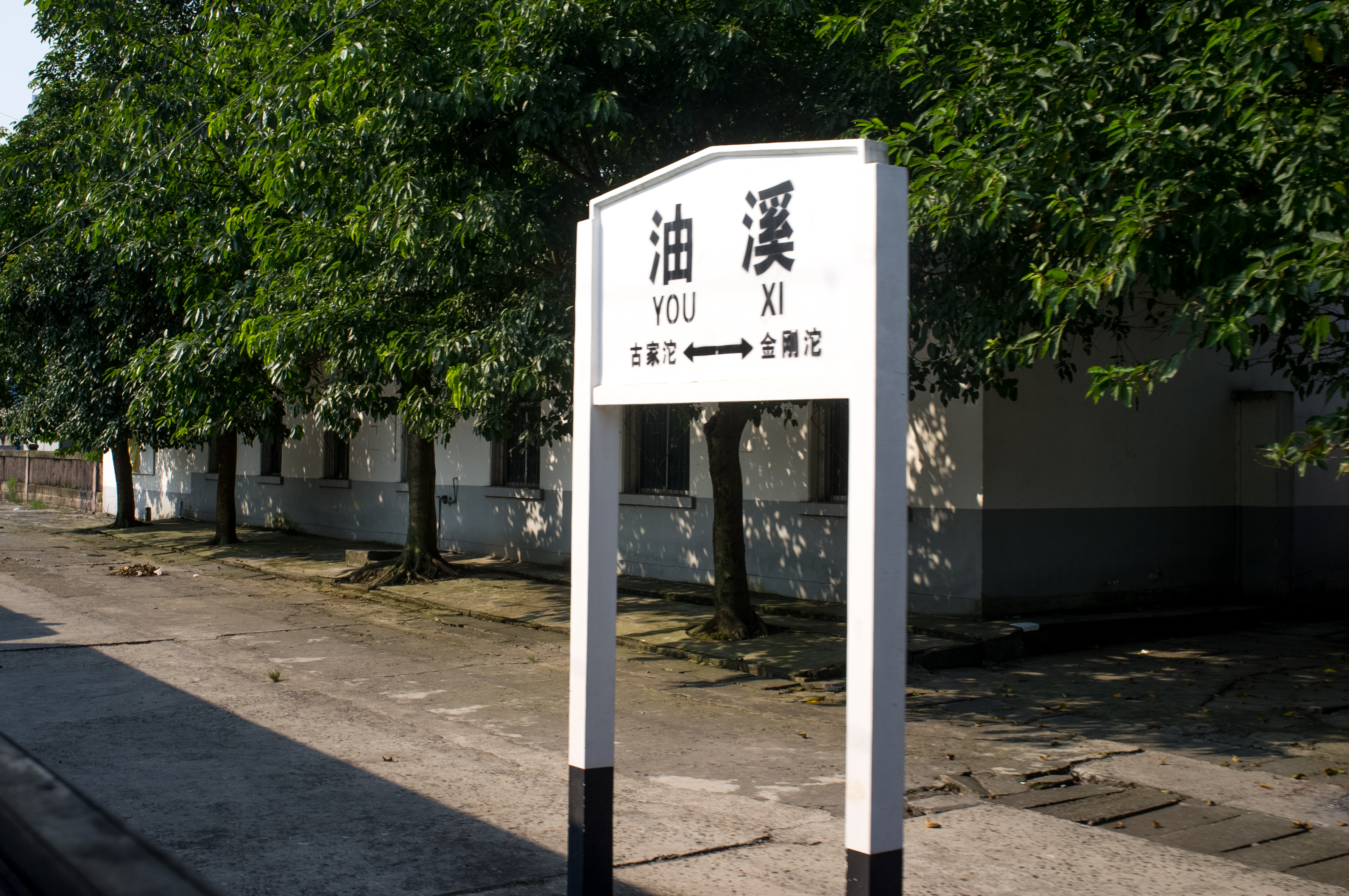 中文（中国大陆）: 成渝铁路油溪站